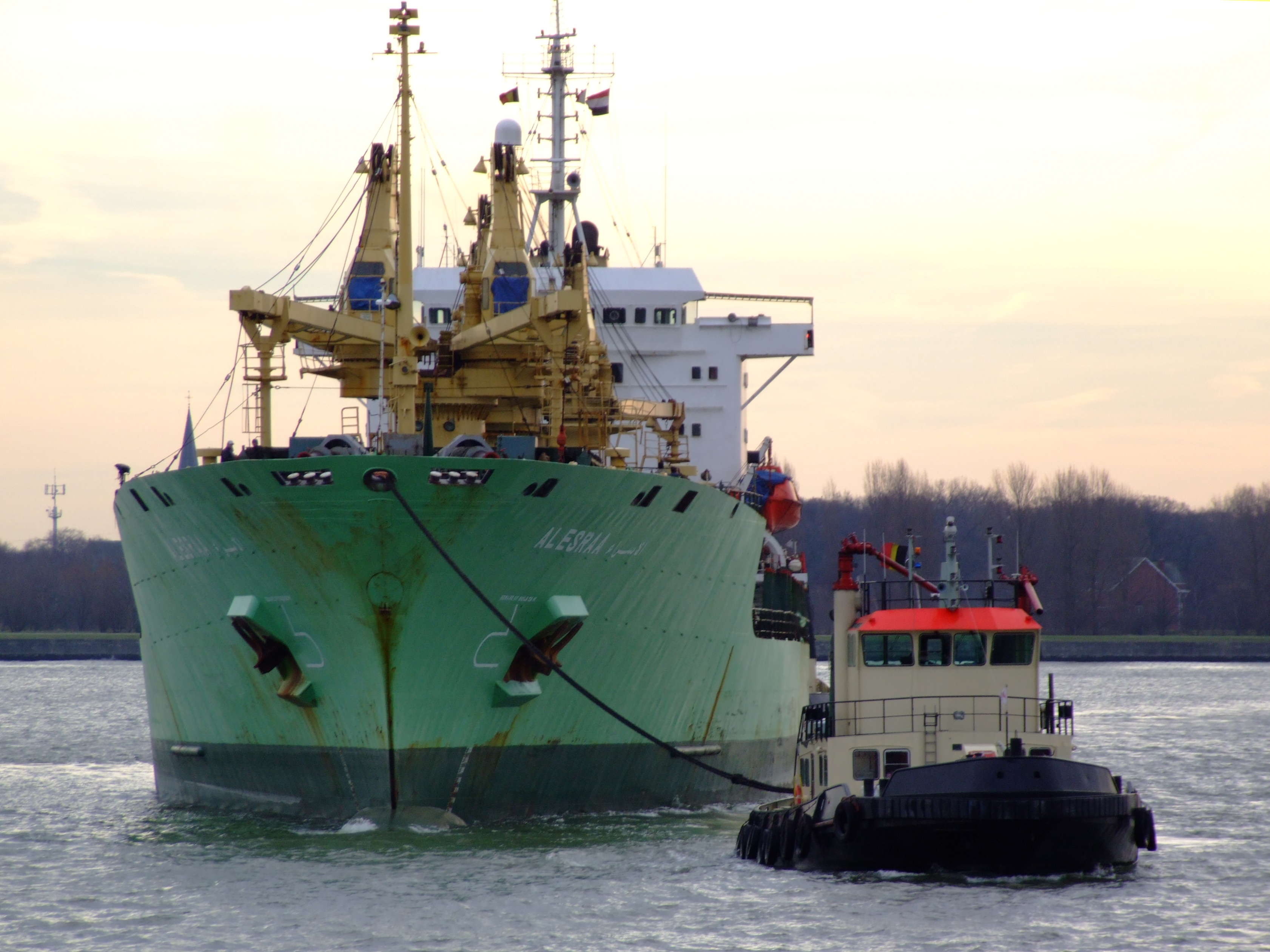 Al Esraa - IMO 9037020